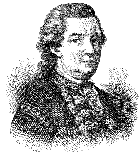 F.H. af Chapman